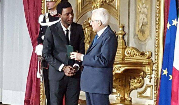 Yvan Sagnet durante la premiazione al Quirinale